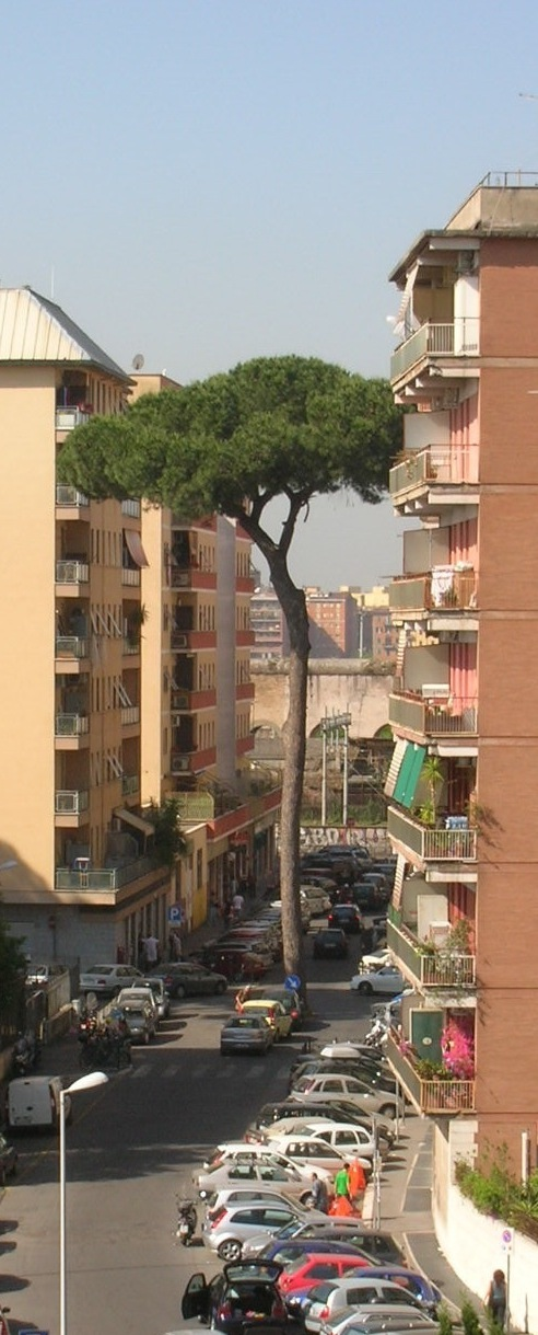 Pinus Pinea a Roma nel quartiere Pigneto